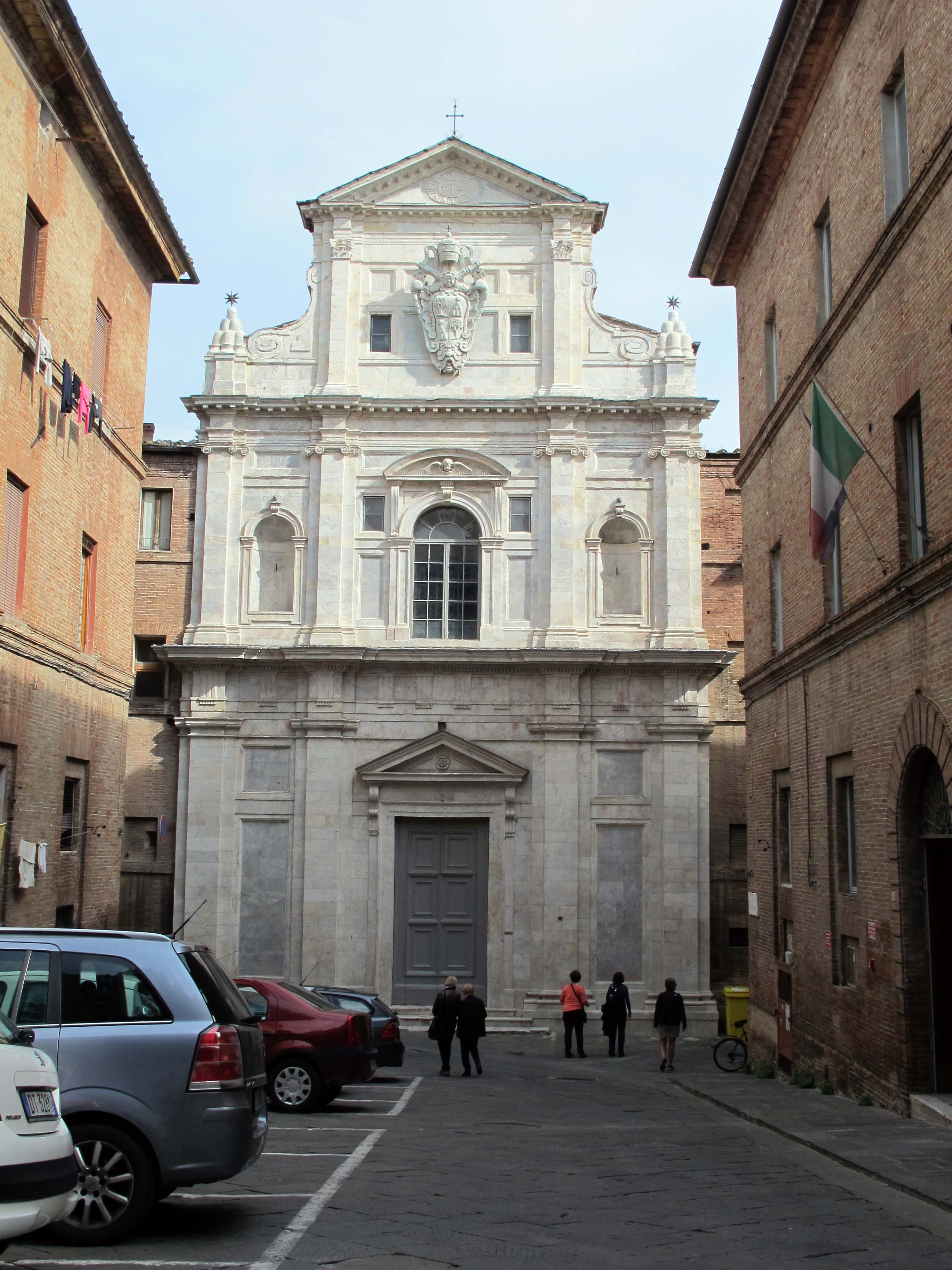 Siena, Via Roma e dintorni